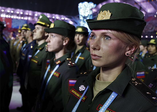 Сборная ВС РФ приняла участие в открытии Всемирных военных игр в Ухане